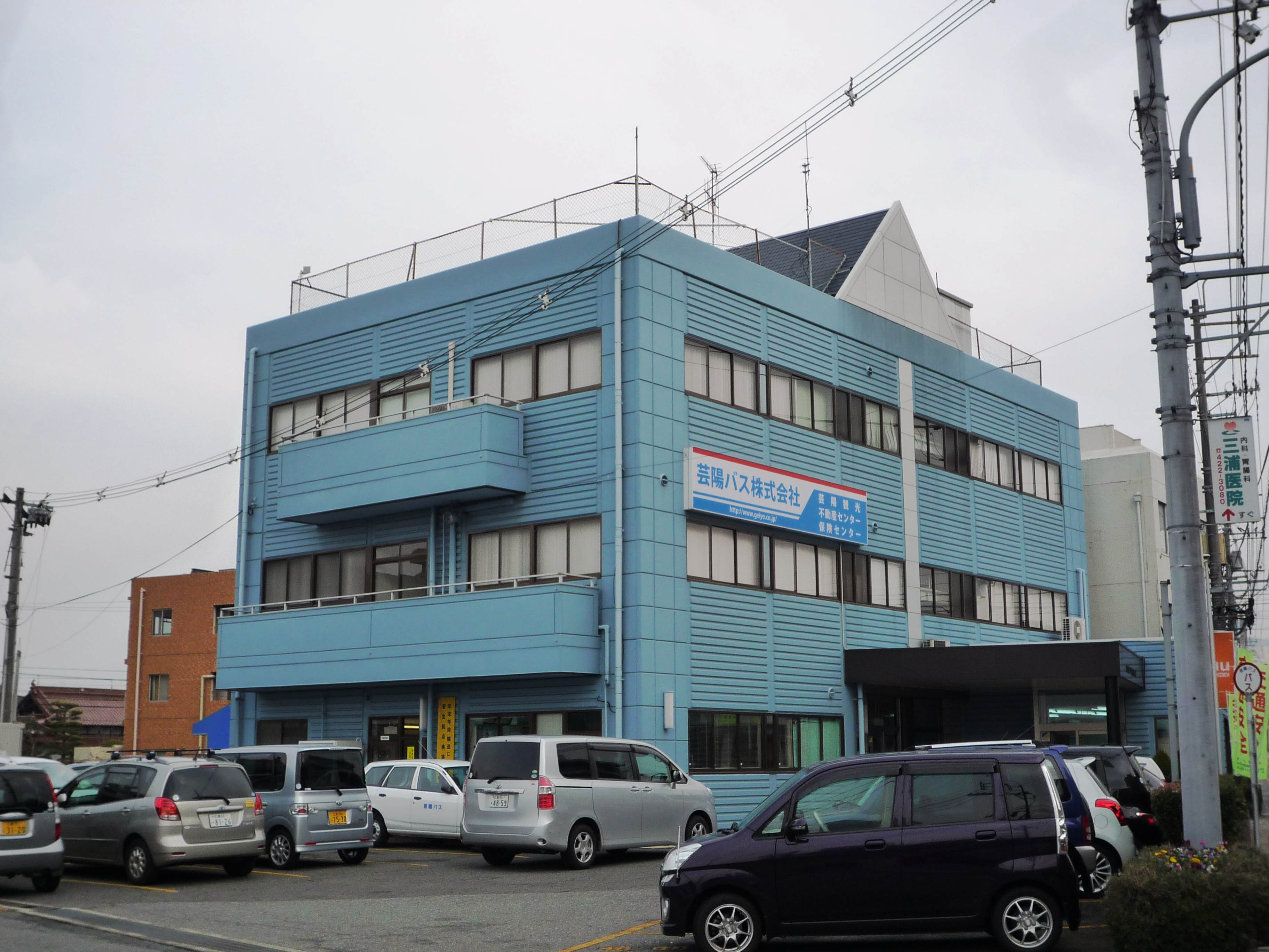 芸陽バス本社